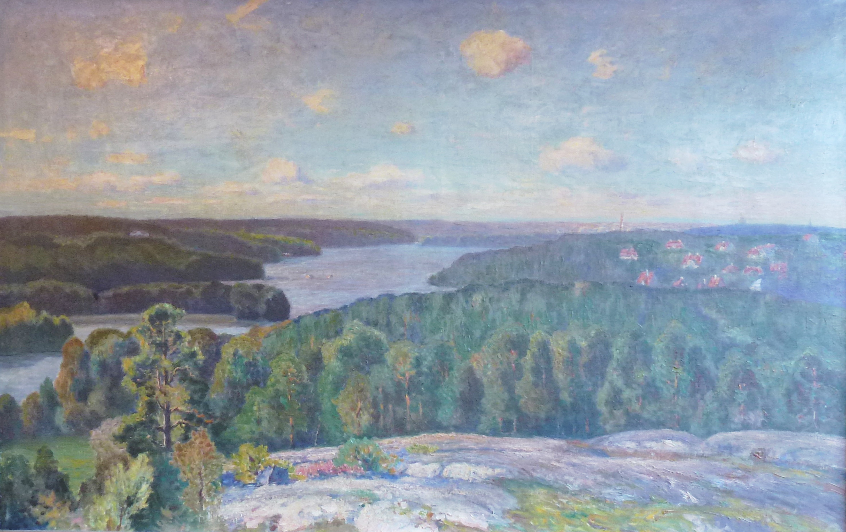 Utsikten är mot nordväst från berget vid Fannydalsplatån.